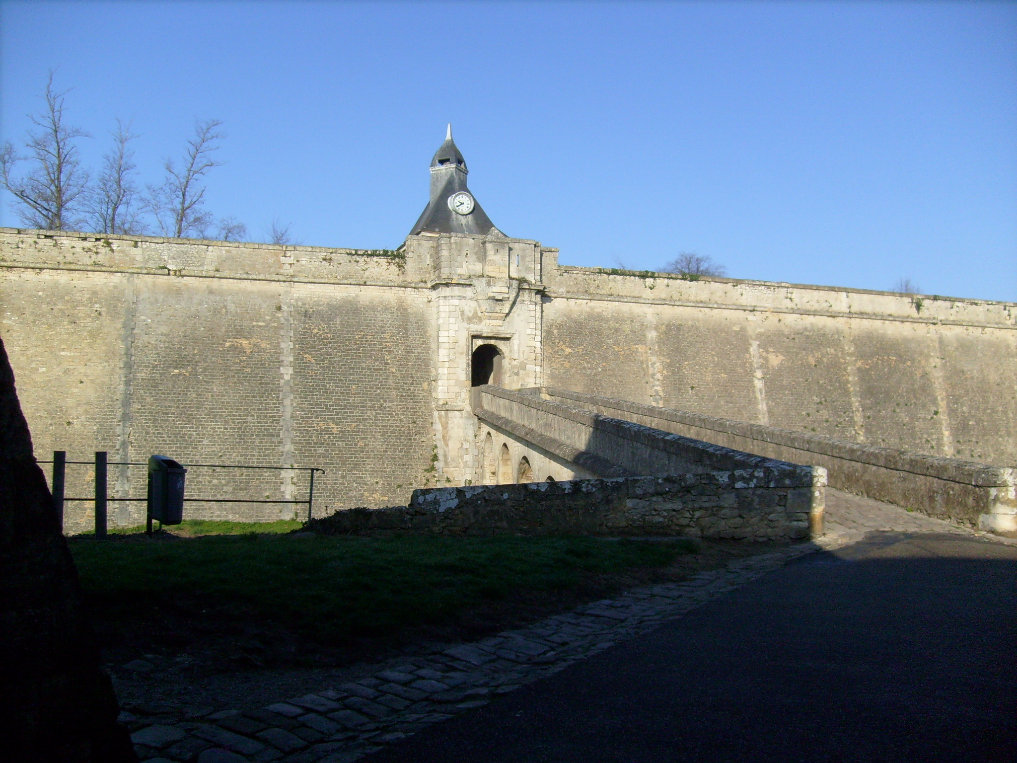 Une des portes de la citadelle de Blaye